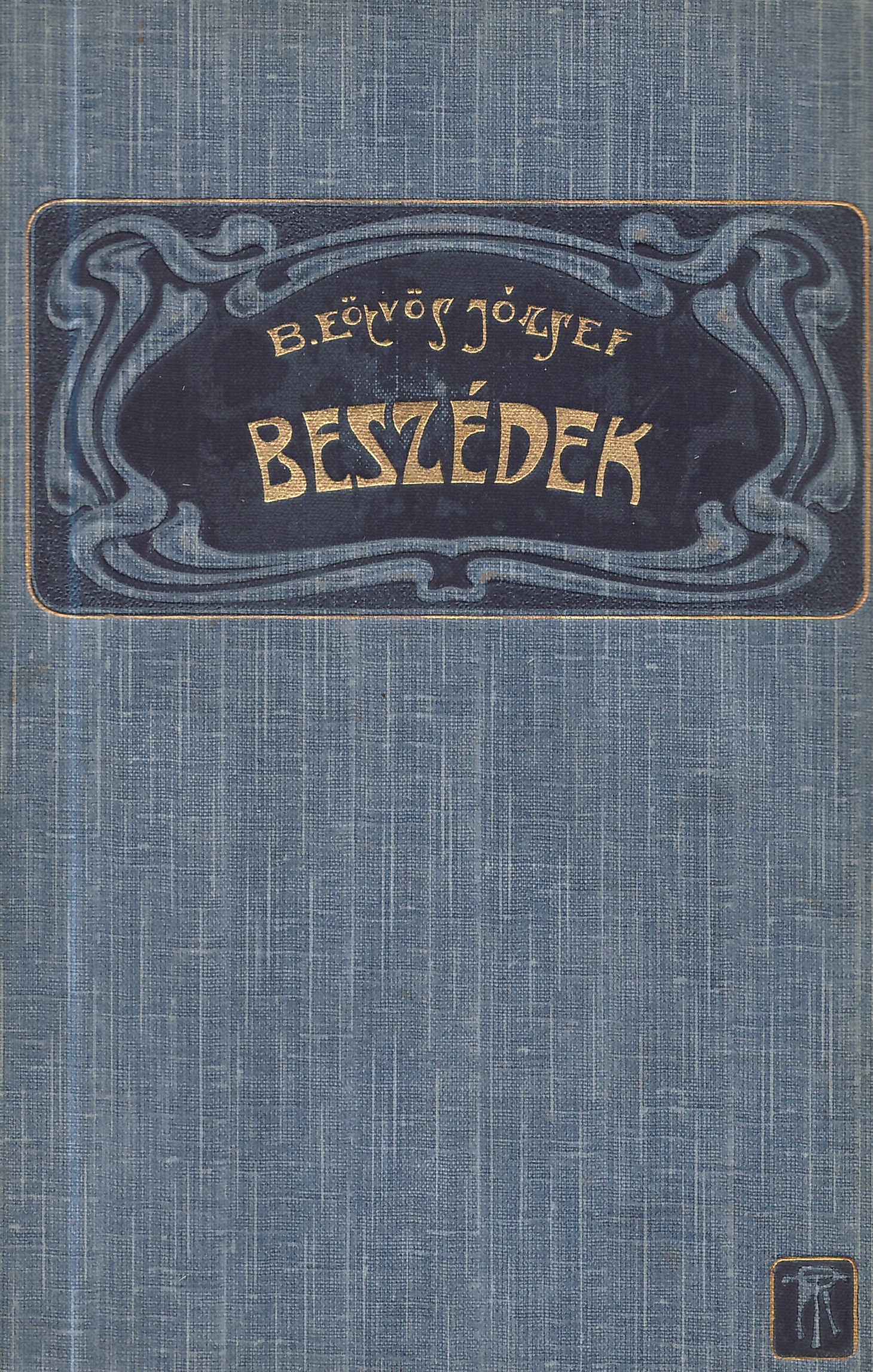 Eötvös József (1813-1871): Beszédek (1900 körül, a borító készítője nem ismert)